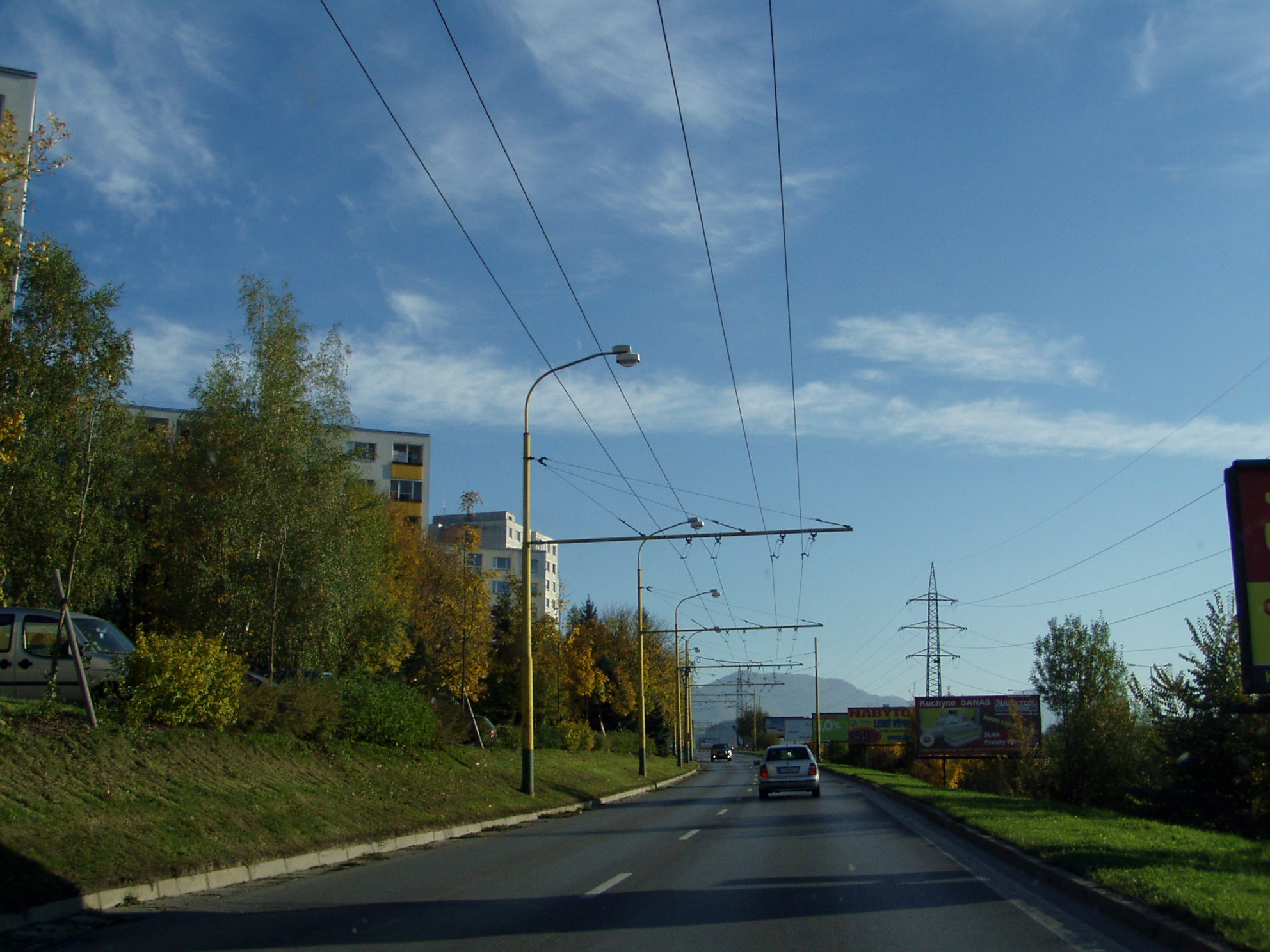 Obvodová ulica v smere z centra